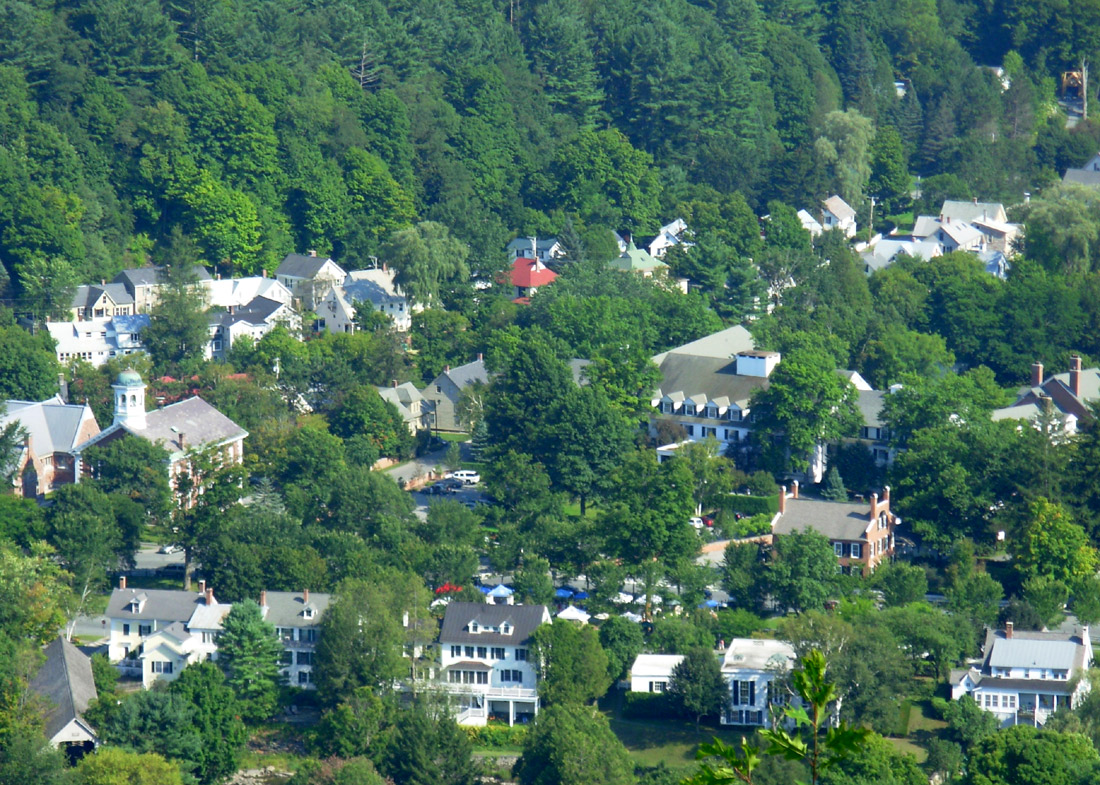 Вид на город Вудсток, штат Вермонт, с вершины одной из ближайших сопок